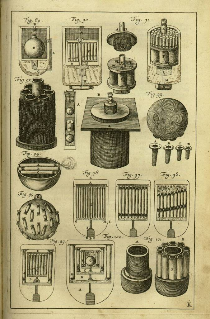 Беларуская (тарашкевіца): Казімер Семяновіч. Ілюстрацыя з кнігі "Вялікае мастацтва артылерыі" (лац. "Artis magnae artileriae pars prima")